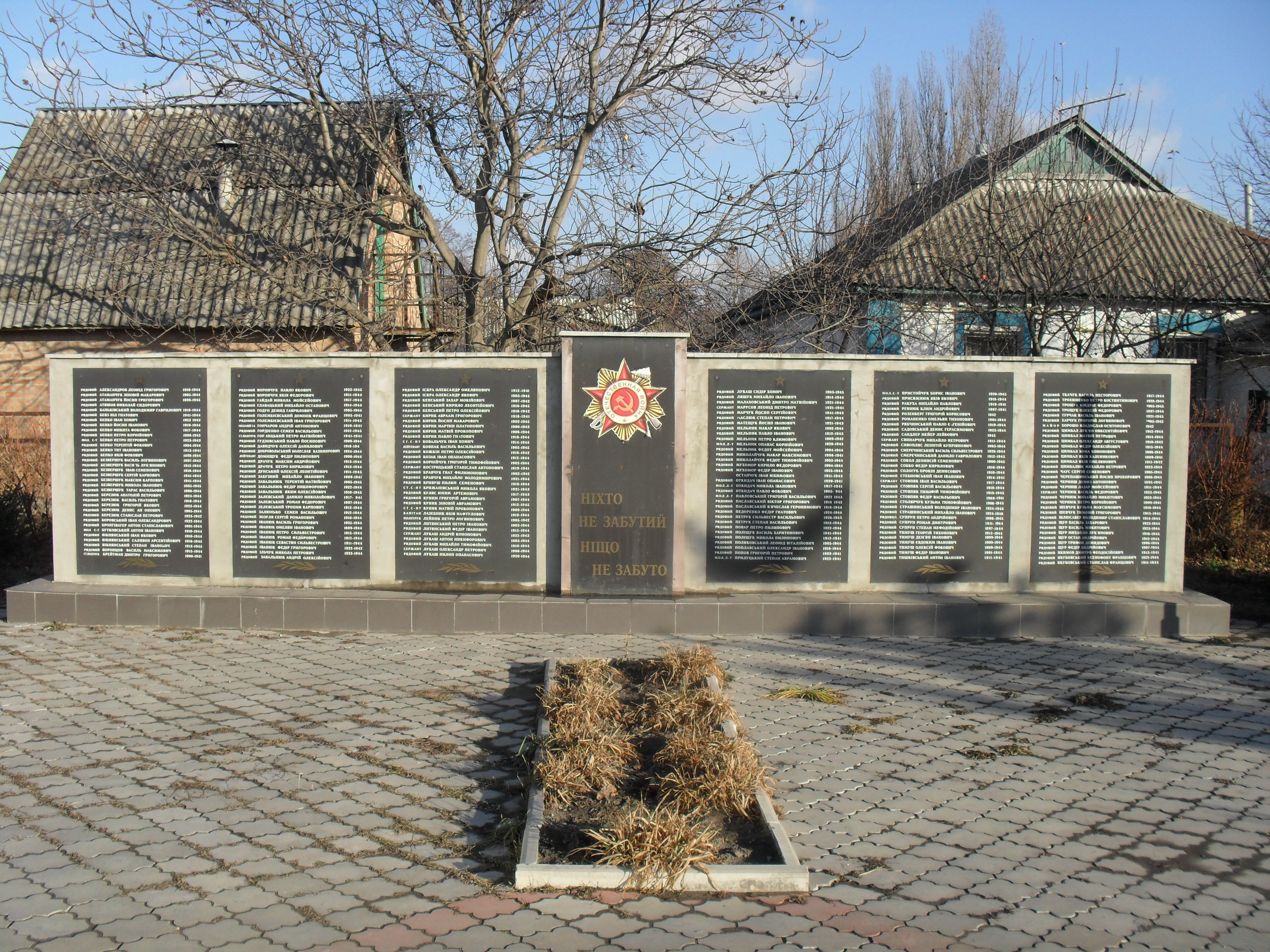 смт Турбів. Меморіал загиблим в роки Великої Вітчизняної війни